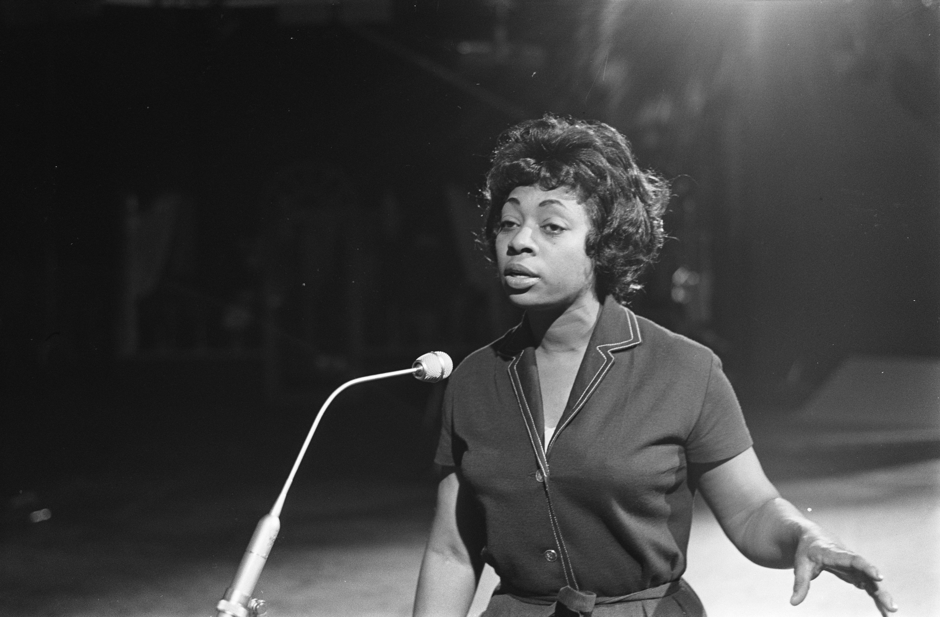 Collectie / Archief : Fotocollectie Anefo Reportage / Serie : [ onbekend ] Beschrijving : Donna Hightower in Kijk der Rijkshow , hier tijdens opname Datum : 16 april 1964 Persoonsnaam : Donna Hightower Fotograaf : Bilsen, Joop van / Anefo Auteursrechthebbende : Nationaal Archief Materiaalsoort : Negatief (zwart/wit) Nummer archiefinventaris : bekijk toegang 2.24.01.05 Bestanddeelnummer : 916-3139